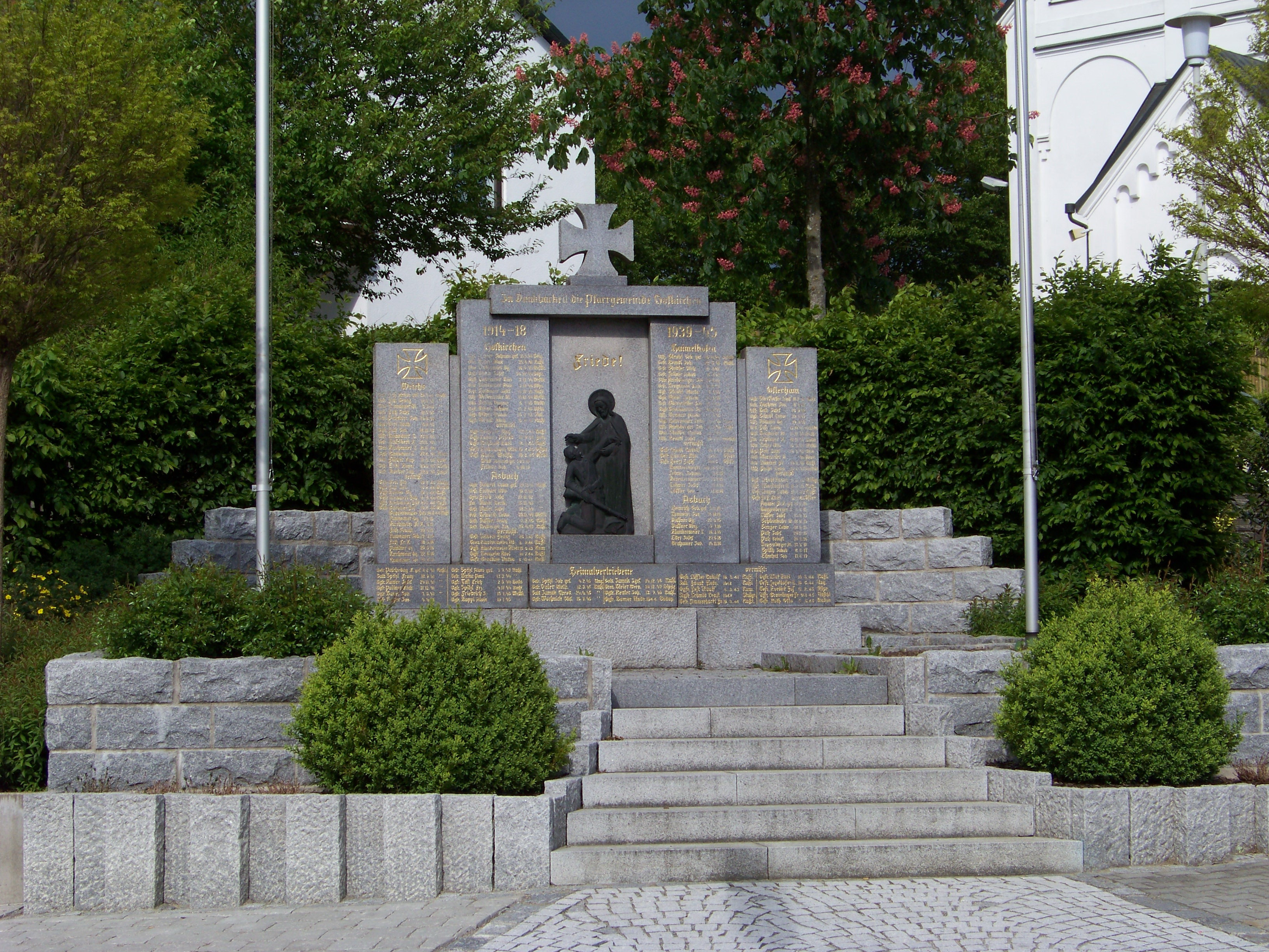 Laberweinting, Hofkirchen. Kriegerdenkmal am Dorfplatz.